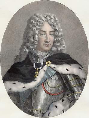 Беларуская (тарашкевіца): Аўгуст Моцны